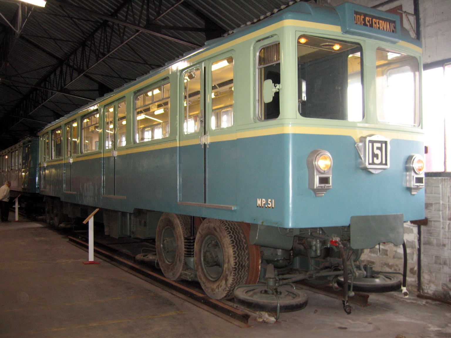 Vue de 3/4 du MP 51Journées du patrimoine AMTUIR 15/09/2007.